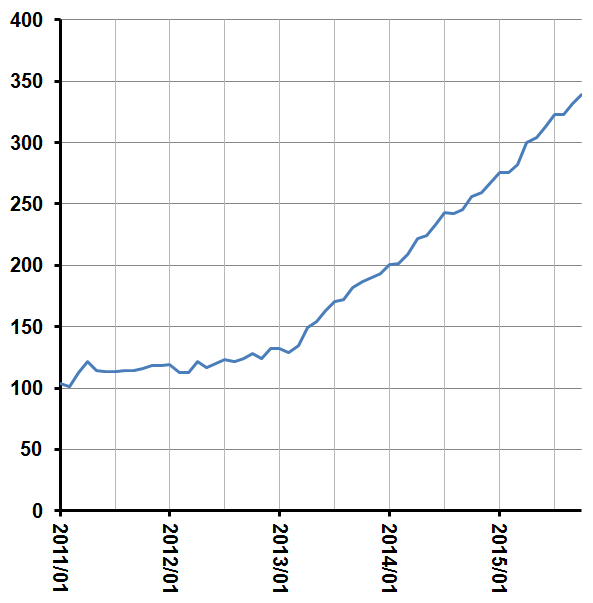 日銀のマネタリーベース。 2011年から。出典 の数値データより自作した。